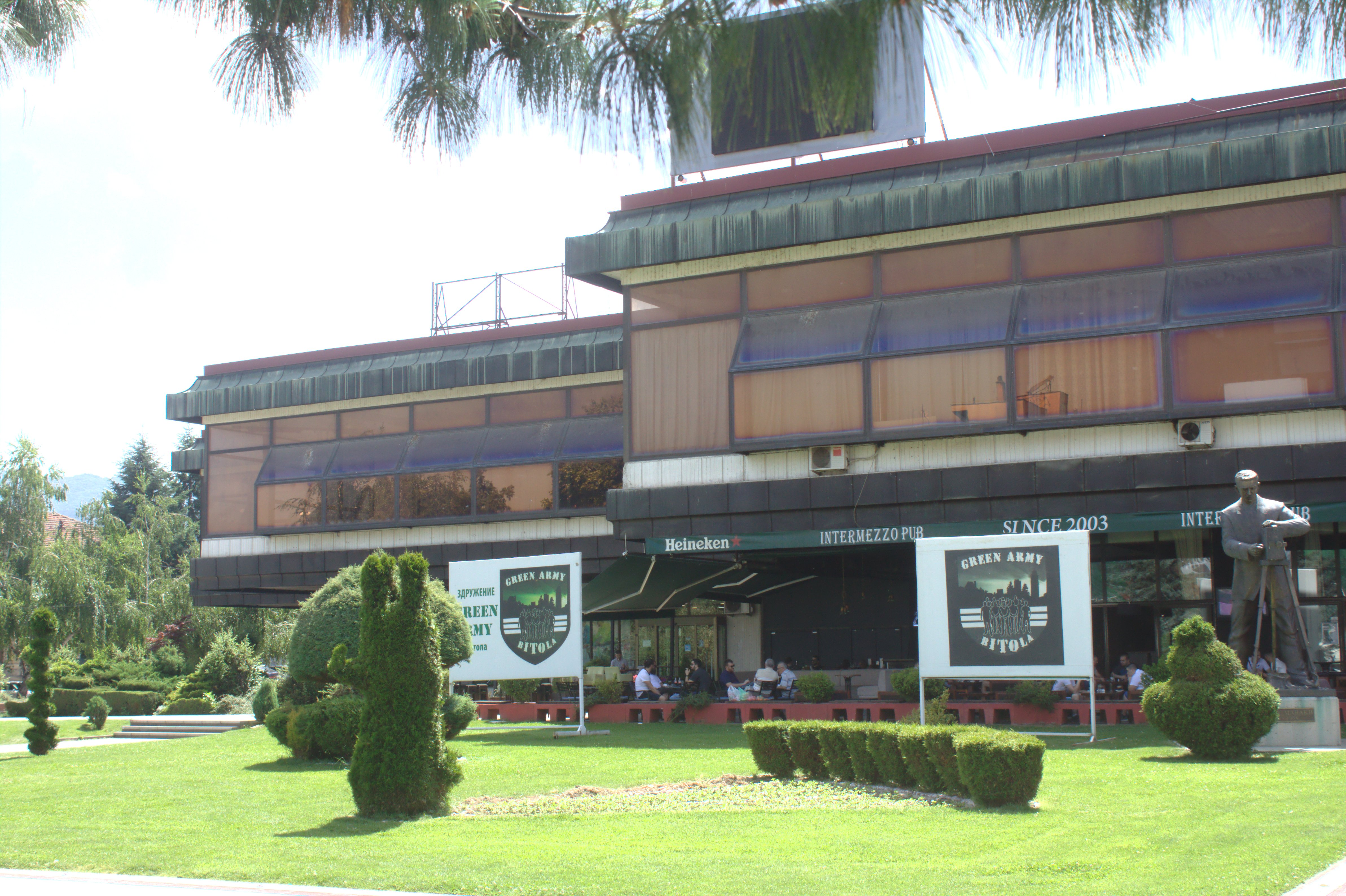 Dům kultury ve městě Bitola, Severní Makedonie